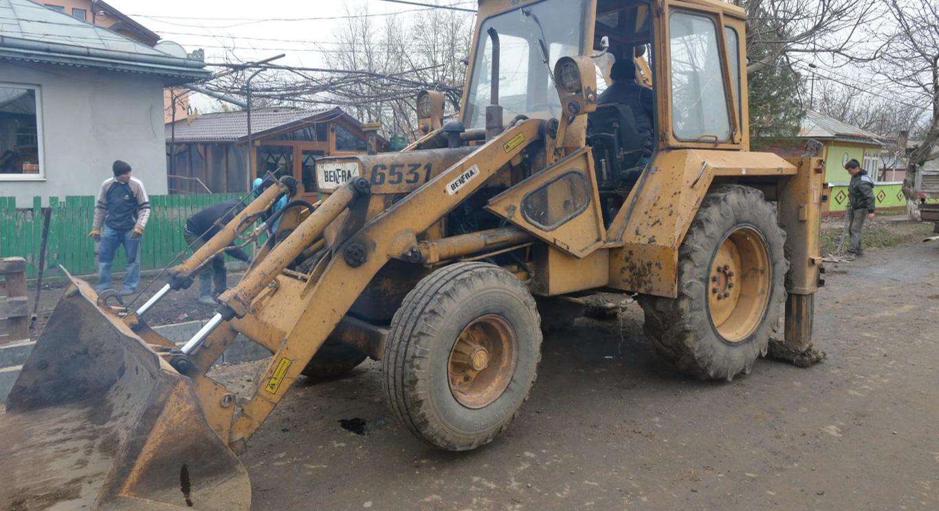 BenFra 6531, lucrări de modernizare a infrastructurii în satul Tabăra (Bivolari, Iași), 2012